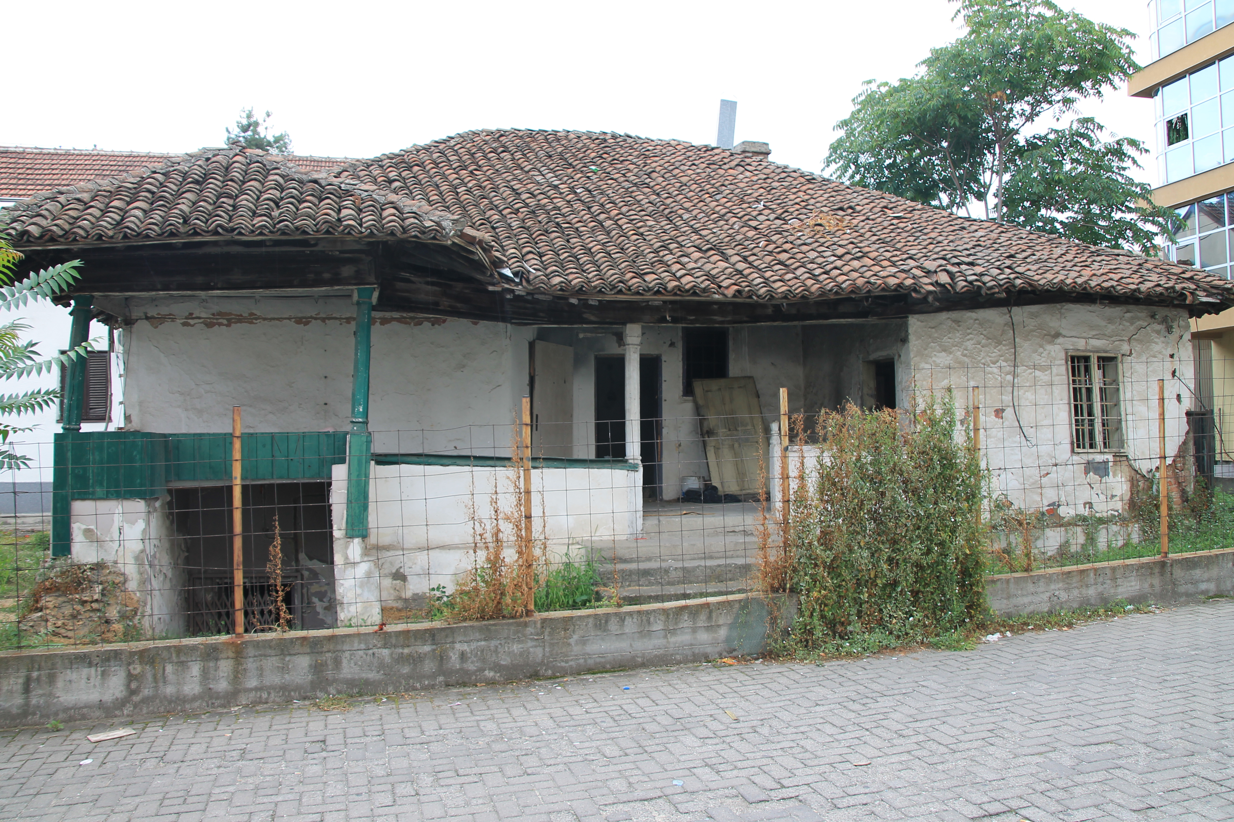 Kuće u Svetozara Markovića (Kragujevac)